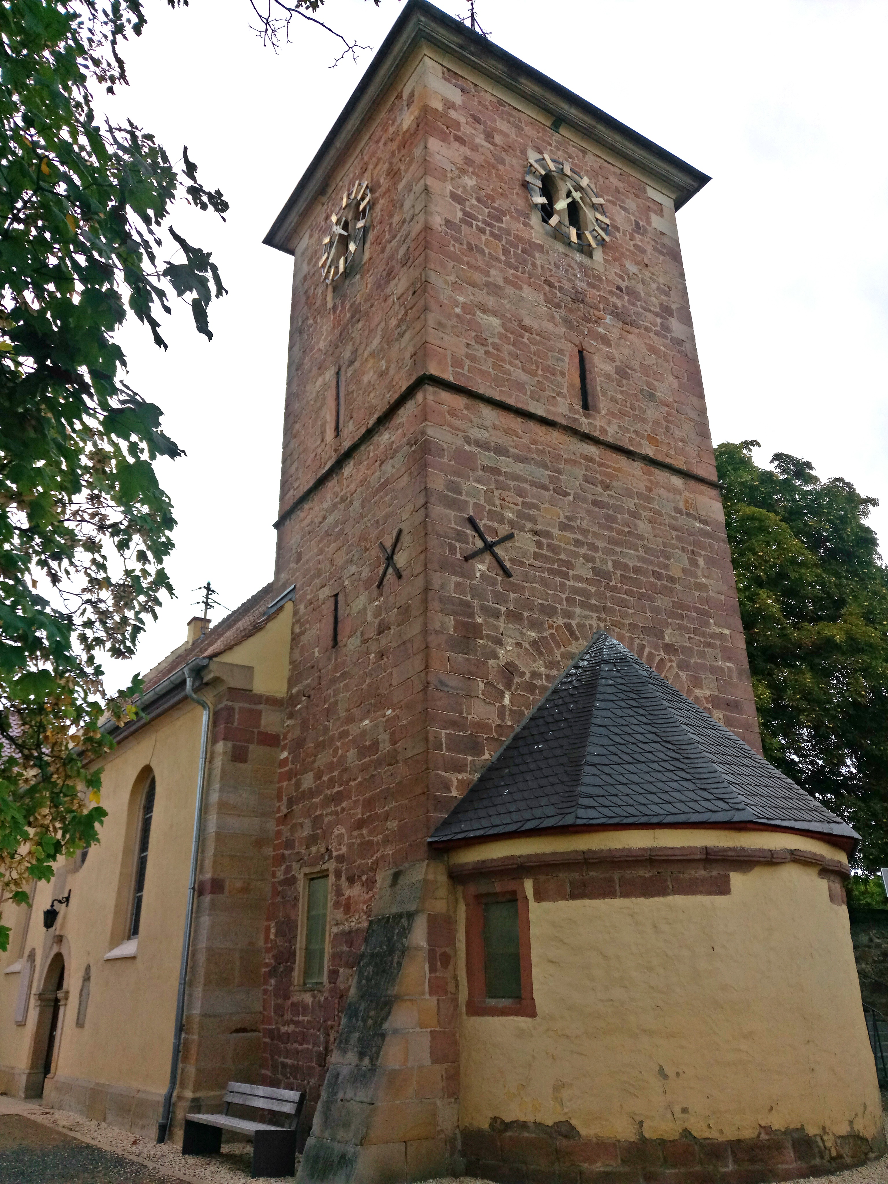 Herxheim am Berg, Prot. Kirche von Osten